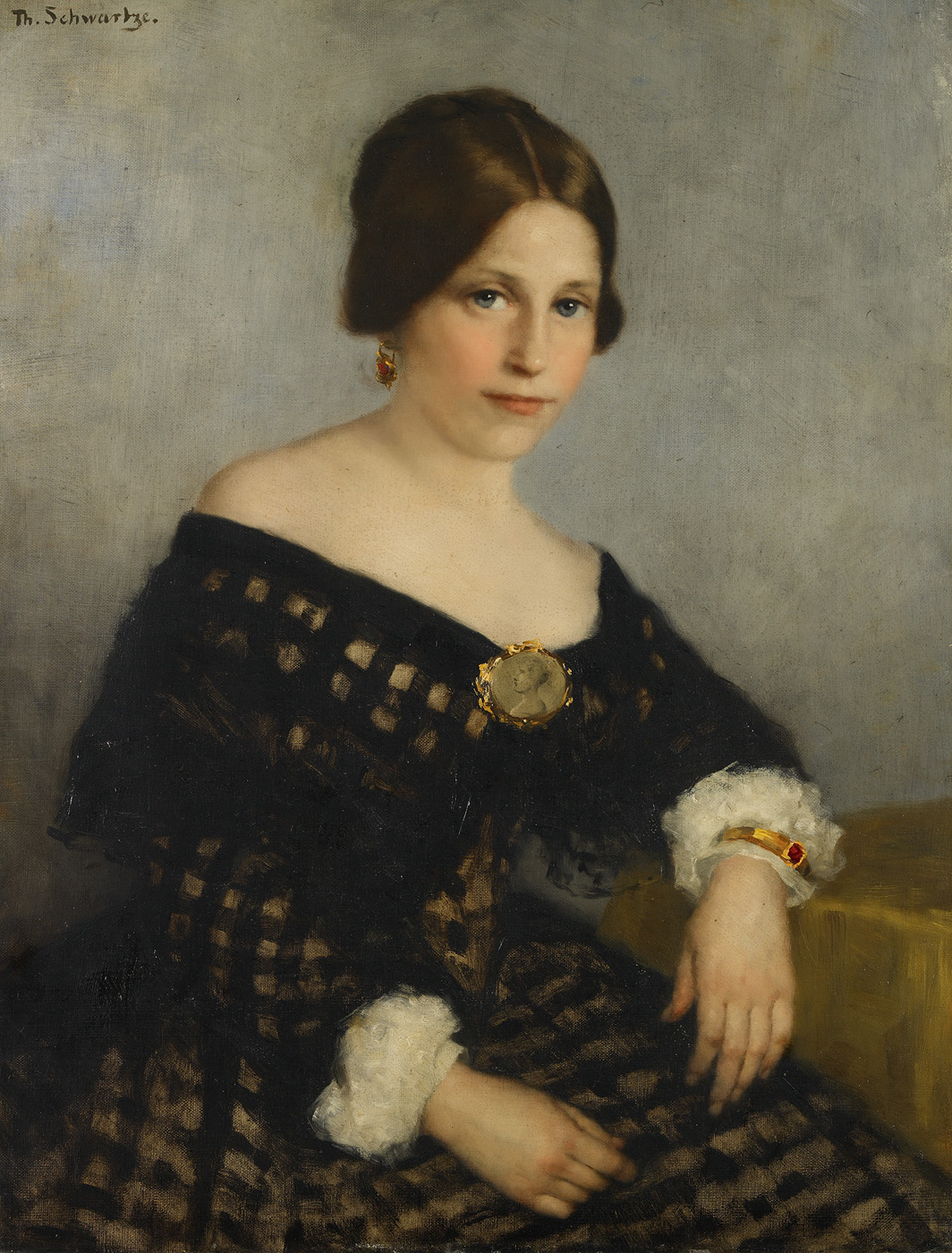 schilderij; portret; vrouwenportret; Bruijn, Sophia Adriana de